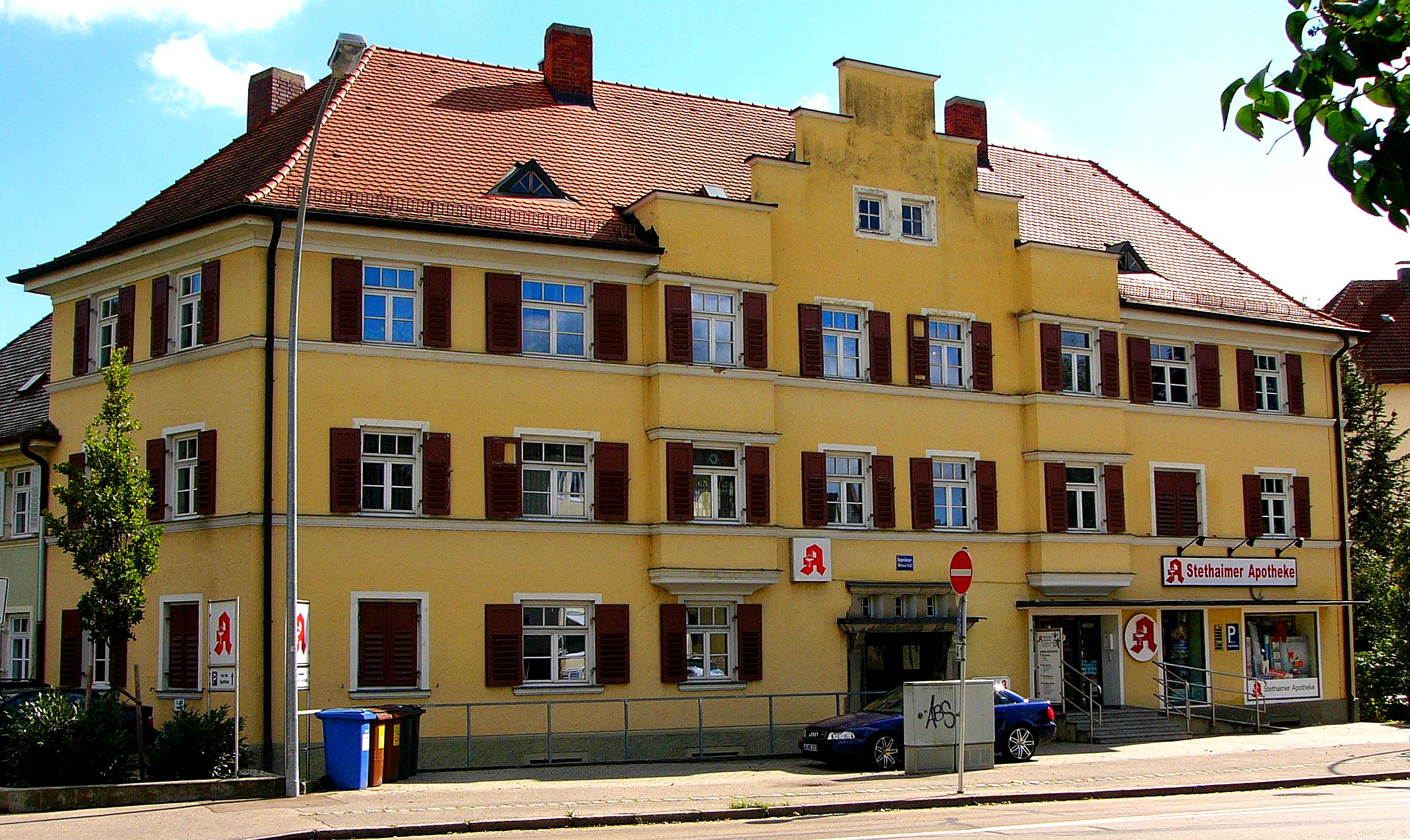 Wohnhaus für Bauunternehmer Alois Harlander, stattlicher dreigeschossiger Walmdachbau, mit traufseitigem Stufengiebel flankiert von zwei Erkern, von Karl Foerstl, 1928/29;This is a photograph of an architectural monument.